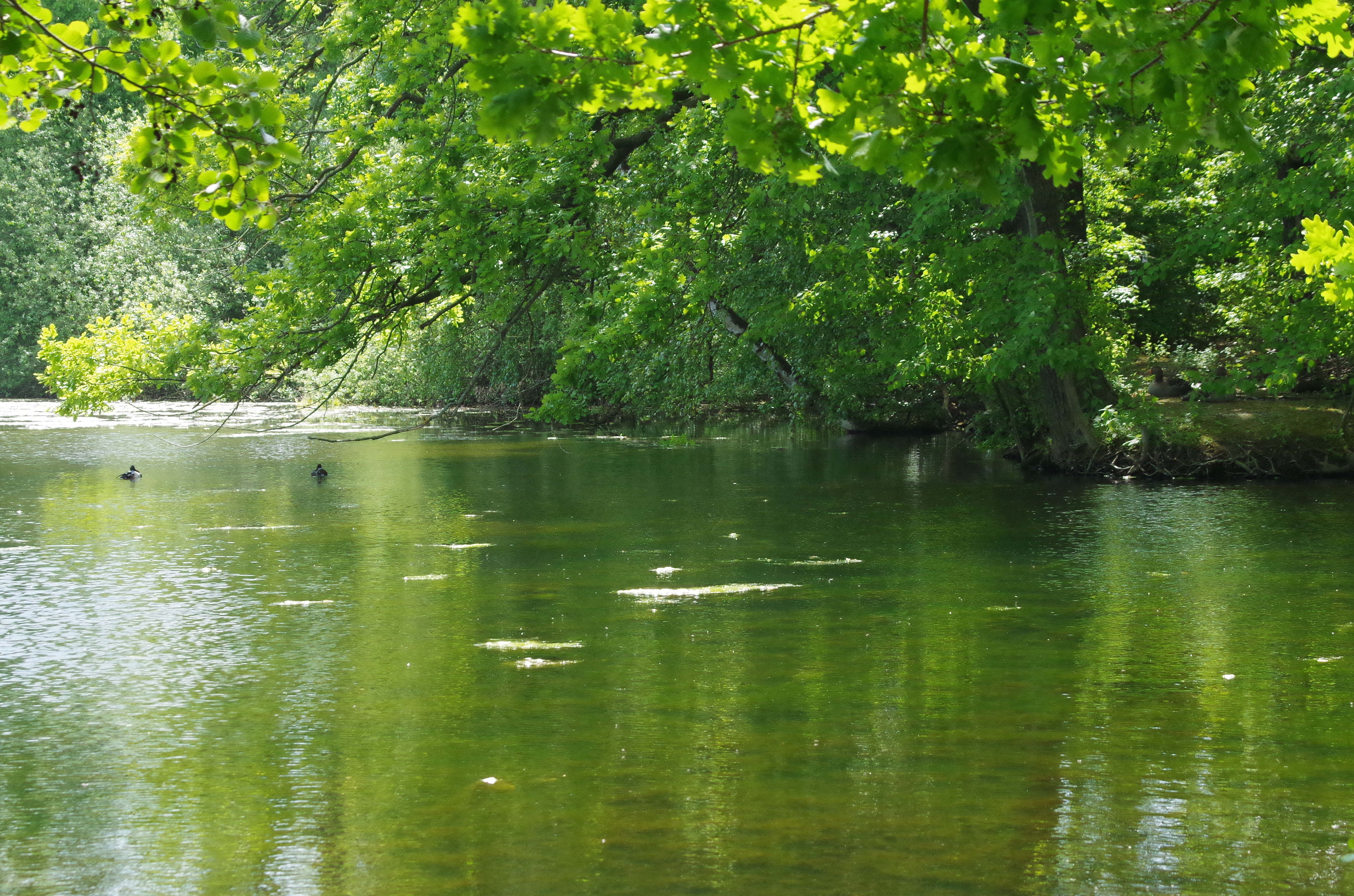 Spiegelung des frischen Grüns in den Teichen Riddagshausens. BR 001. Kategorie: Niedersachsen